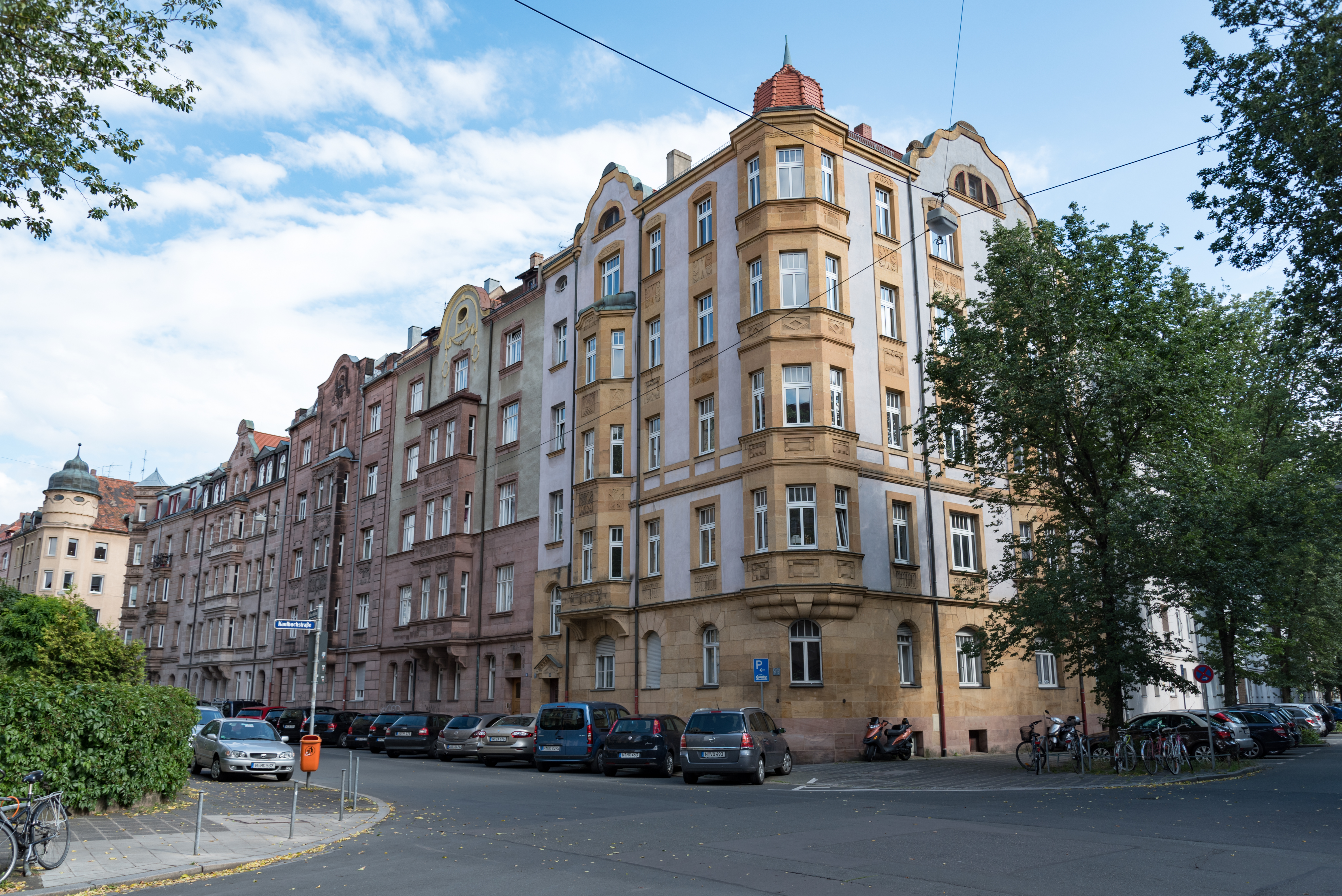 Nürnberg, Meuschelstraße 14, 16, 18, 20